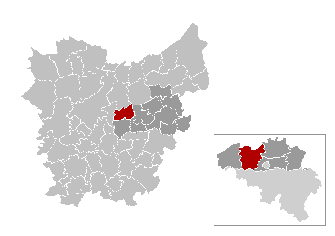 Gemeentekaart, eigen werk Categorie:Kaart met locatie Belgische gemeente